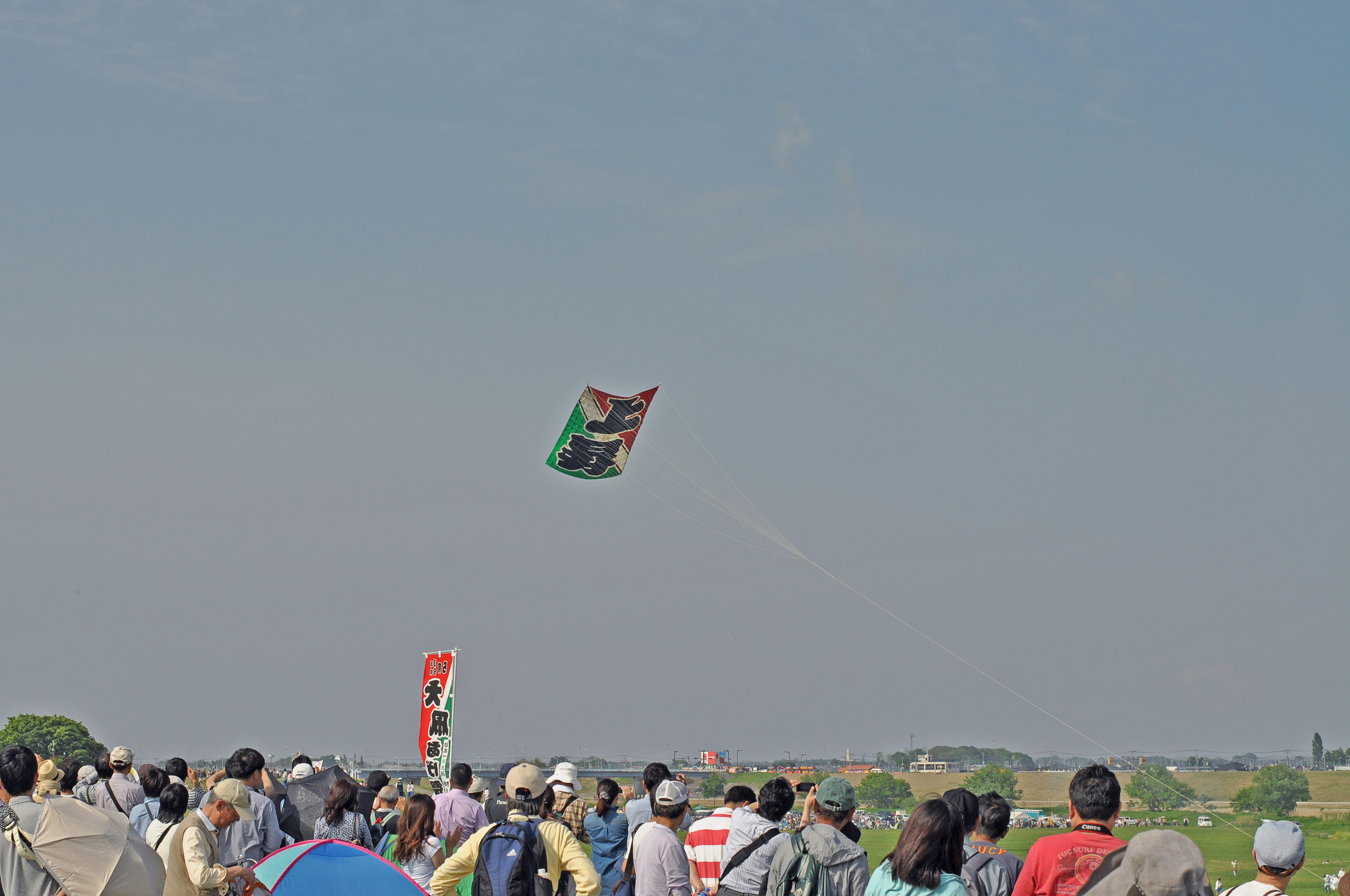 春日部市庄和地区の大凧揚げ